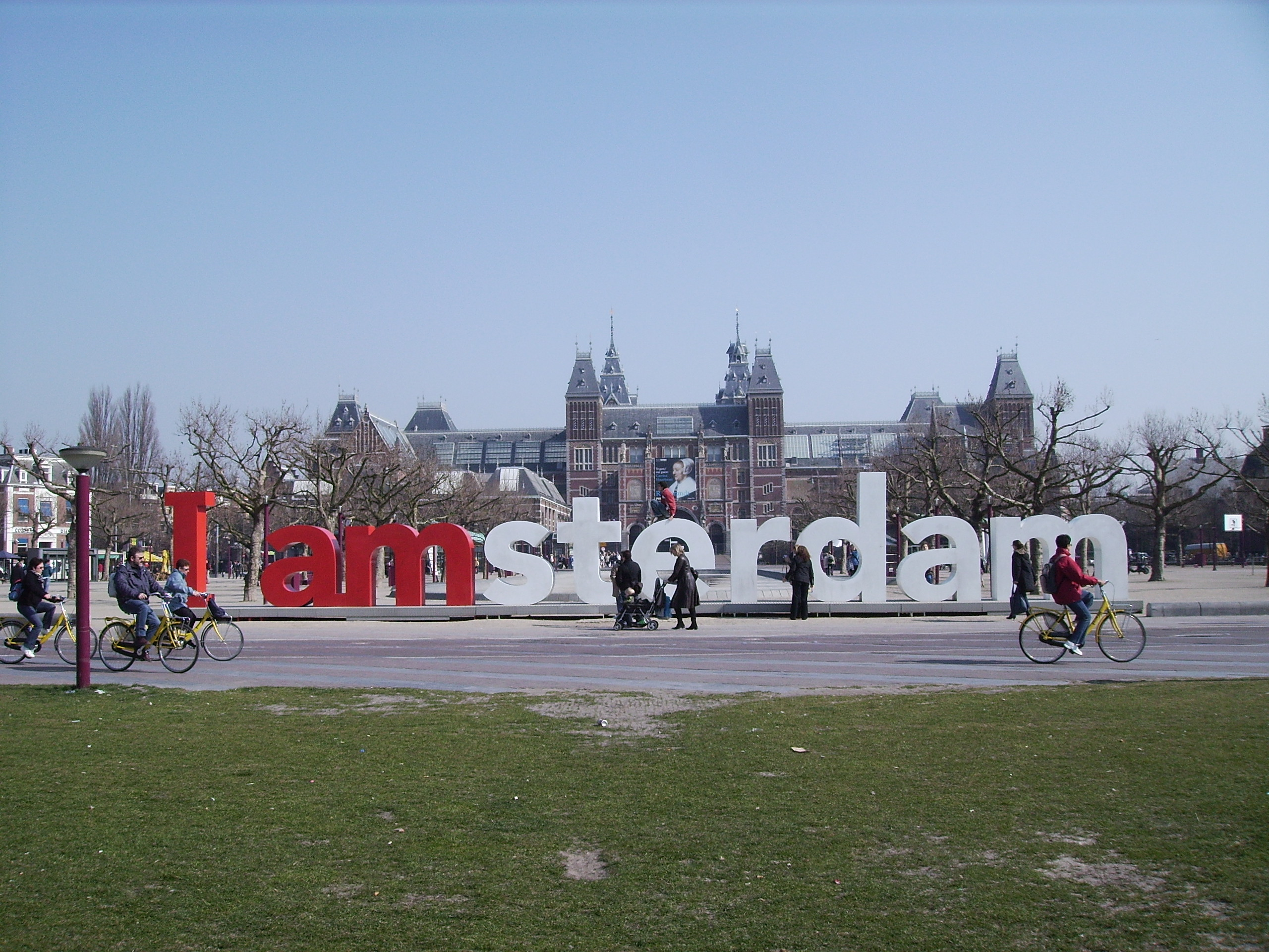 "I am sterdam" achter het Rijksmuseum, Amsterdam.